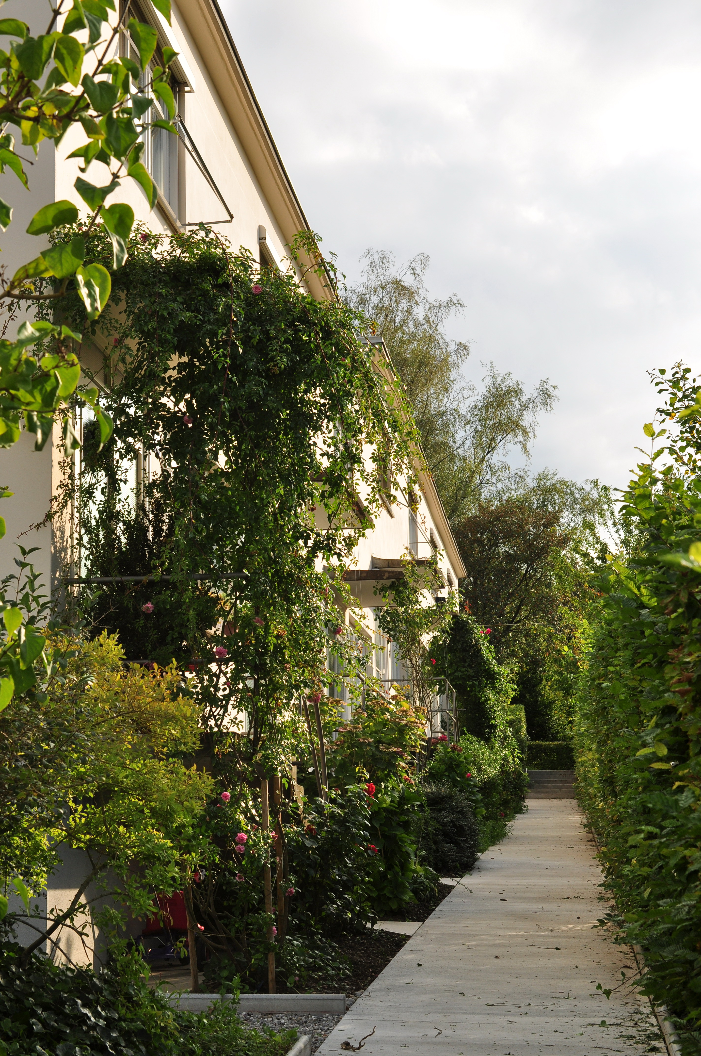 Wohnkolonie Neubühl, Ostbühlstrasse 33–79 in Zürich-Wollishofen (Switzerland)